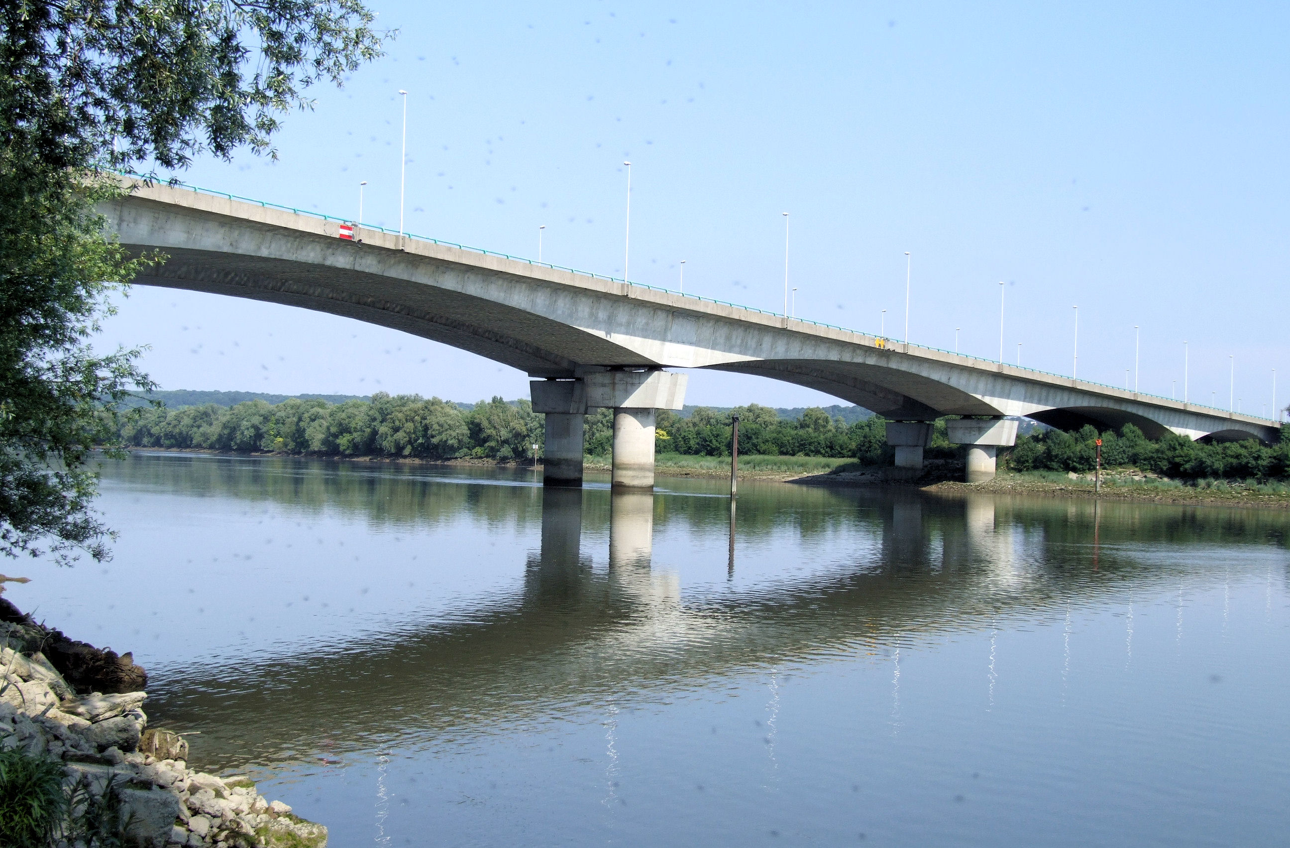 A13 - Viaduc d'Oissel - Franchissement de la Seine